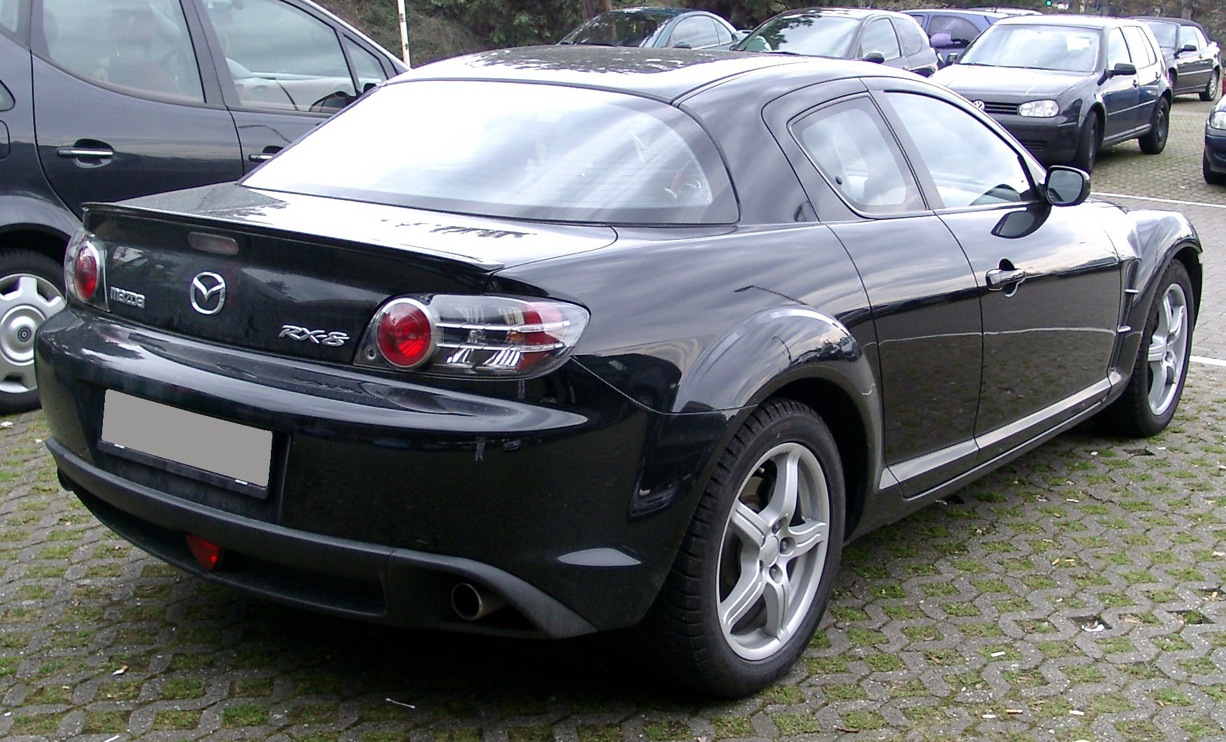 Mazda RX8